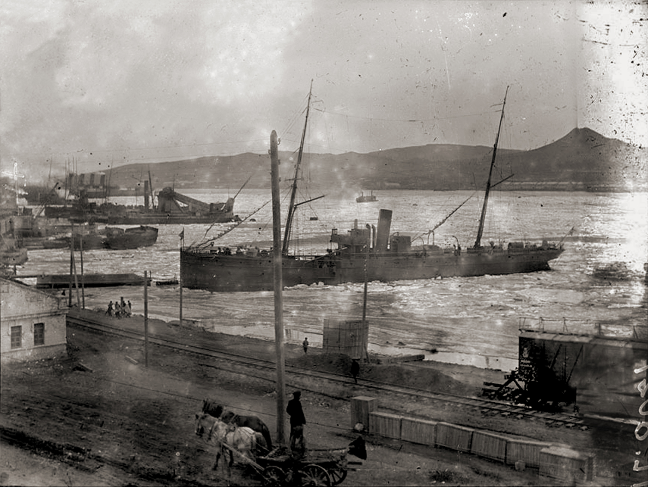 Vladivostok. Quai de dйpart et d'arrivйe du port.7 mars 1919.